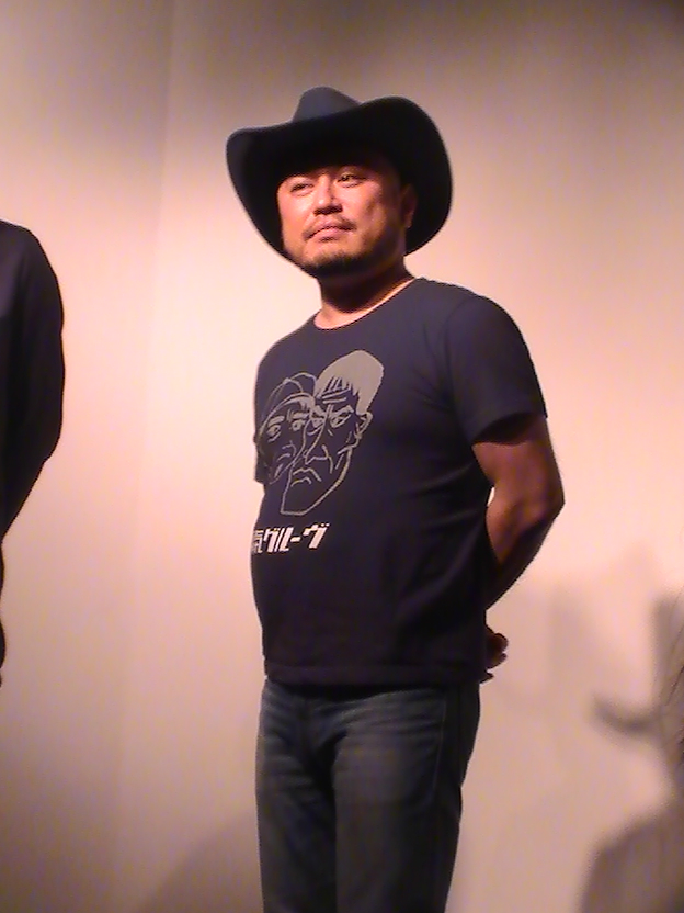 ハリウッドザコシショウ (2017年5月15日)